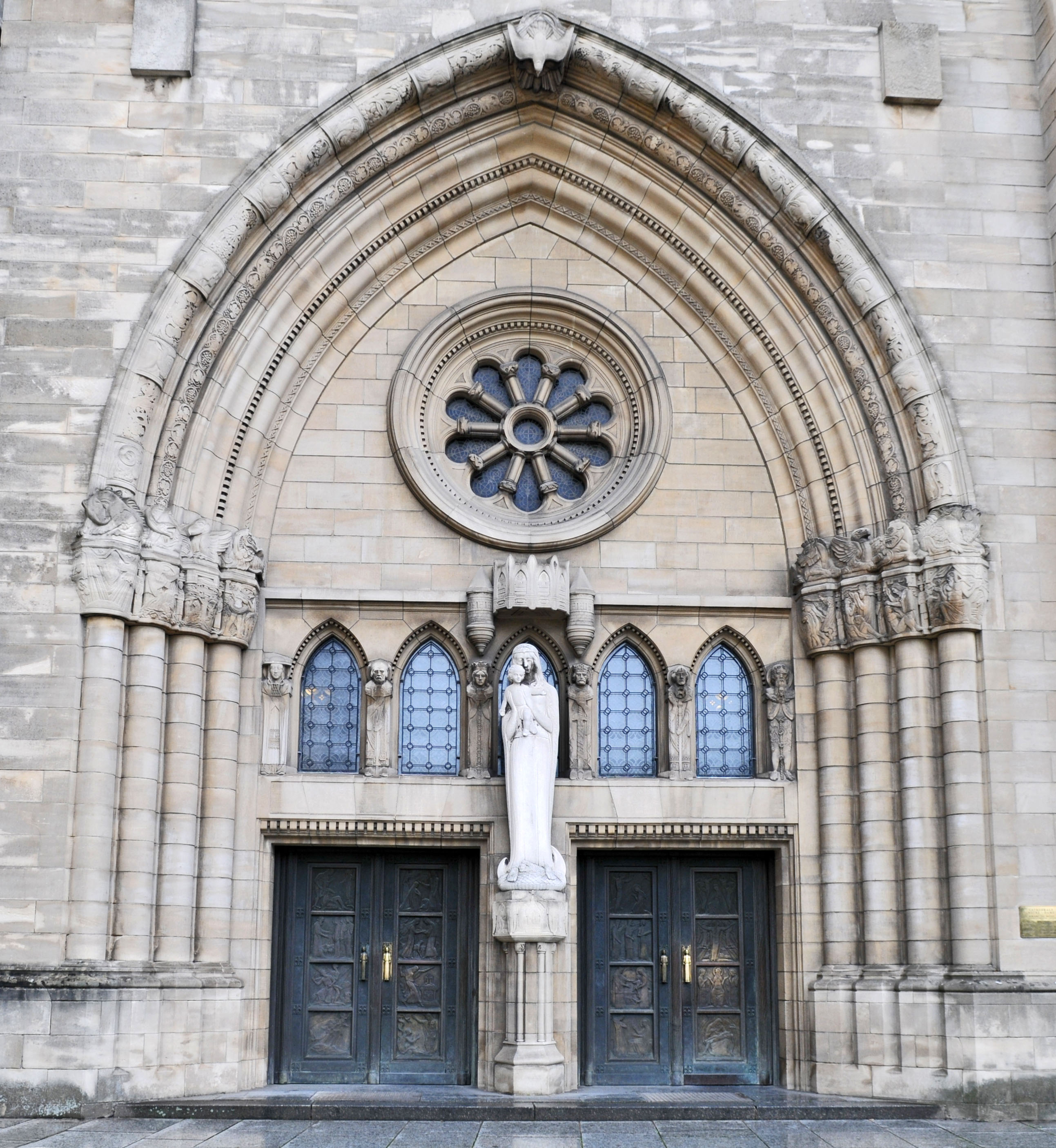 Portal vun der Kathedral Notr-Dame Lëtzebuerg.